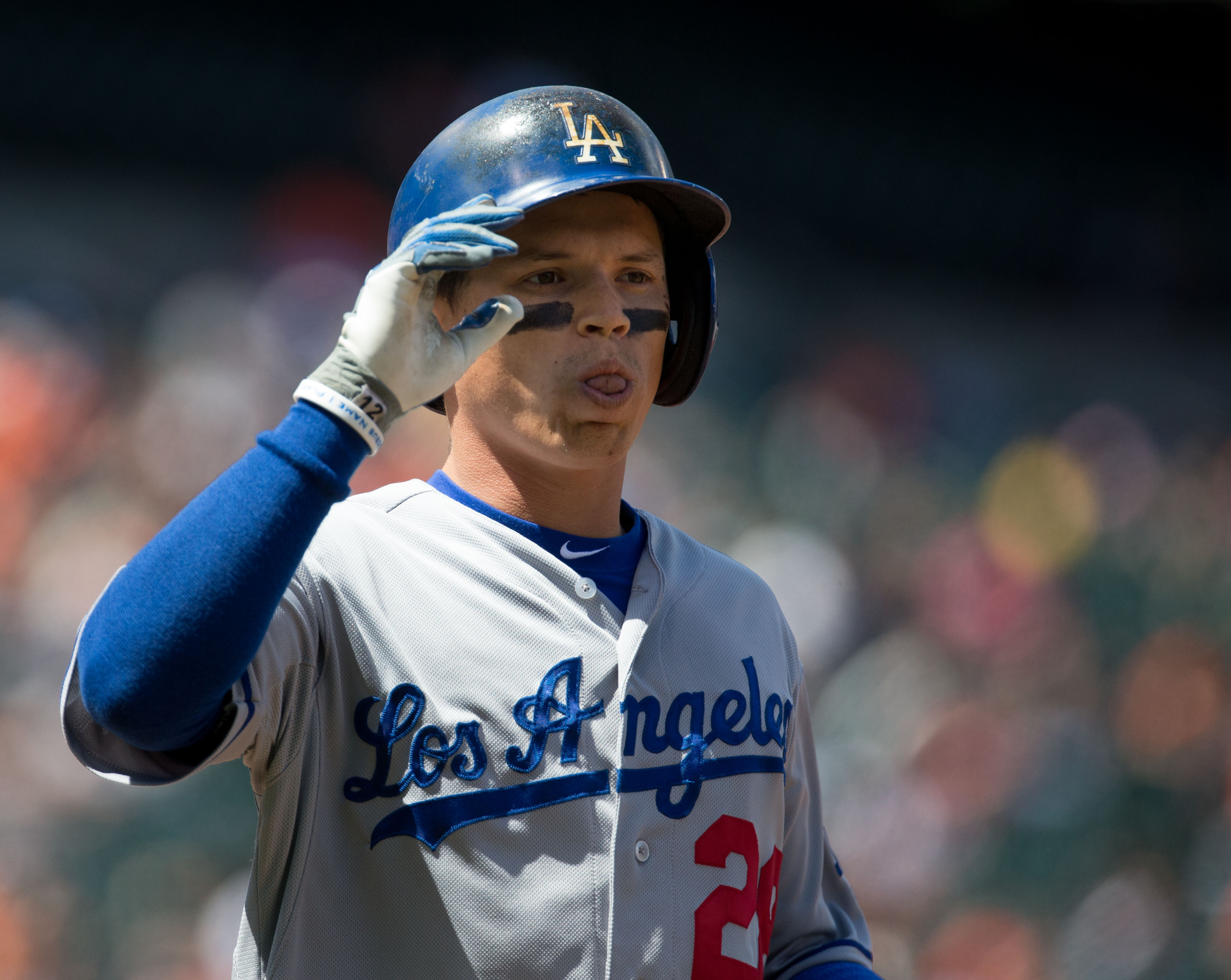 Justin Sellers